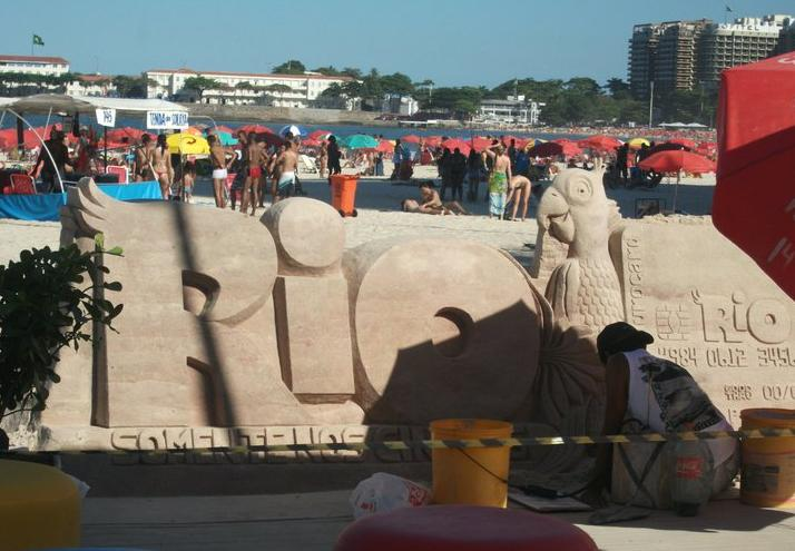 Inscrição feita de areia em praia da cidade de Rio de Janeiro, Brasil.